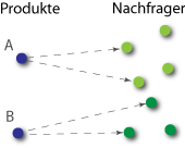 Produktdifferenzierung 3. Ordnung.